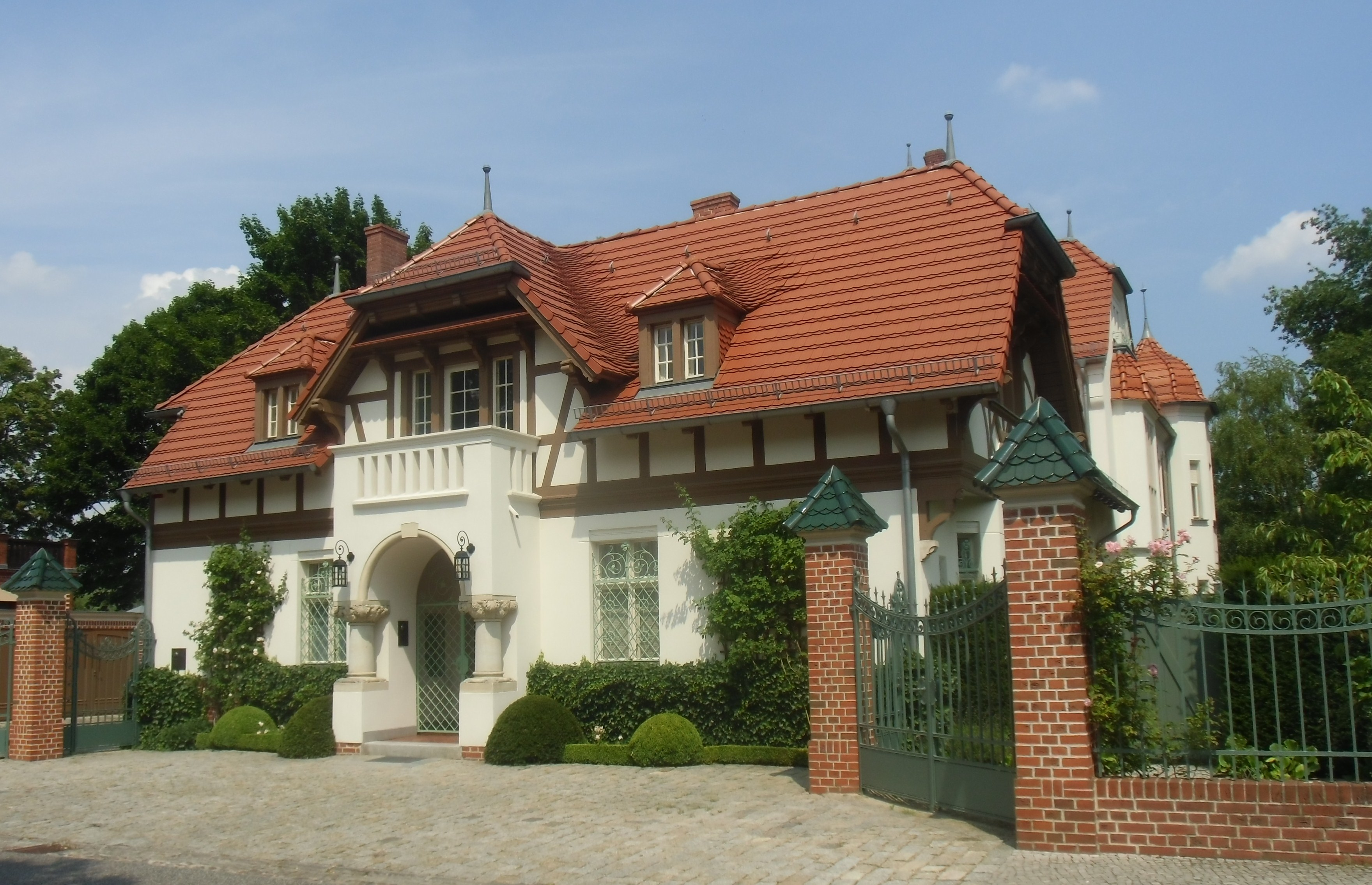 Denkmalgeschütztes Landhaus Wentzel-Heckmann, Baujahr 1900, Architekten Kayser & von Großheim 44